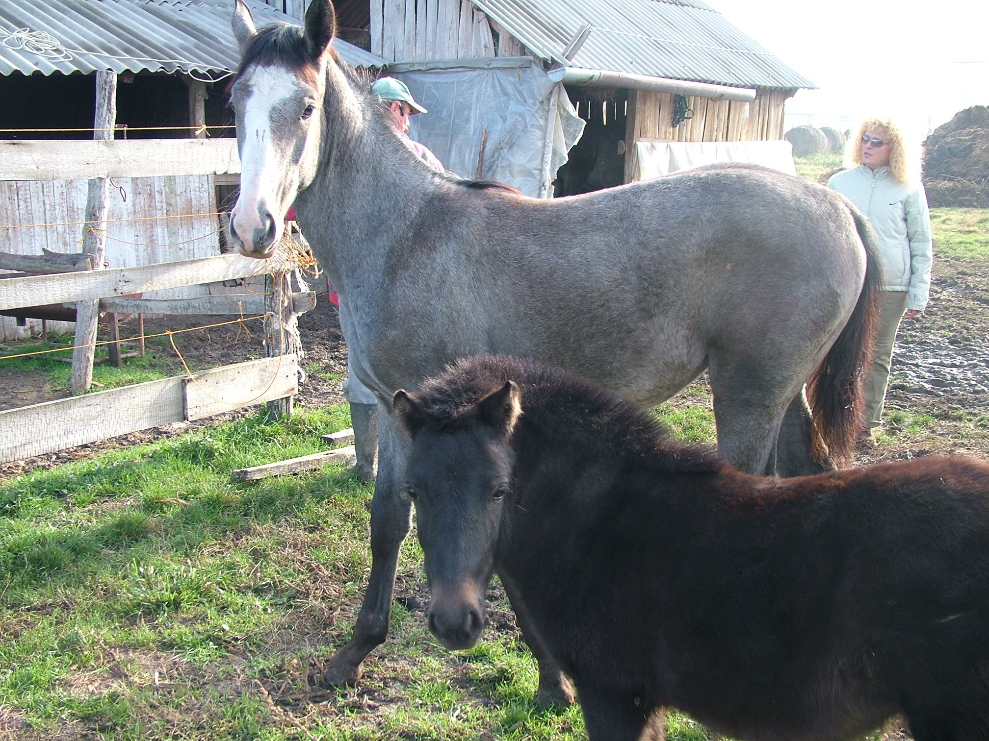 Csikó és póni